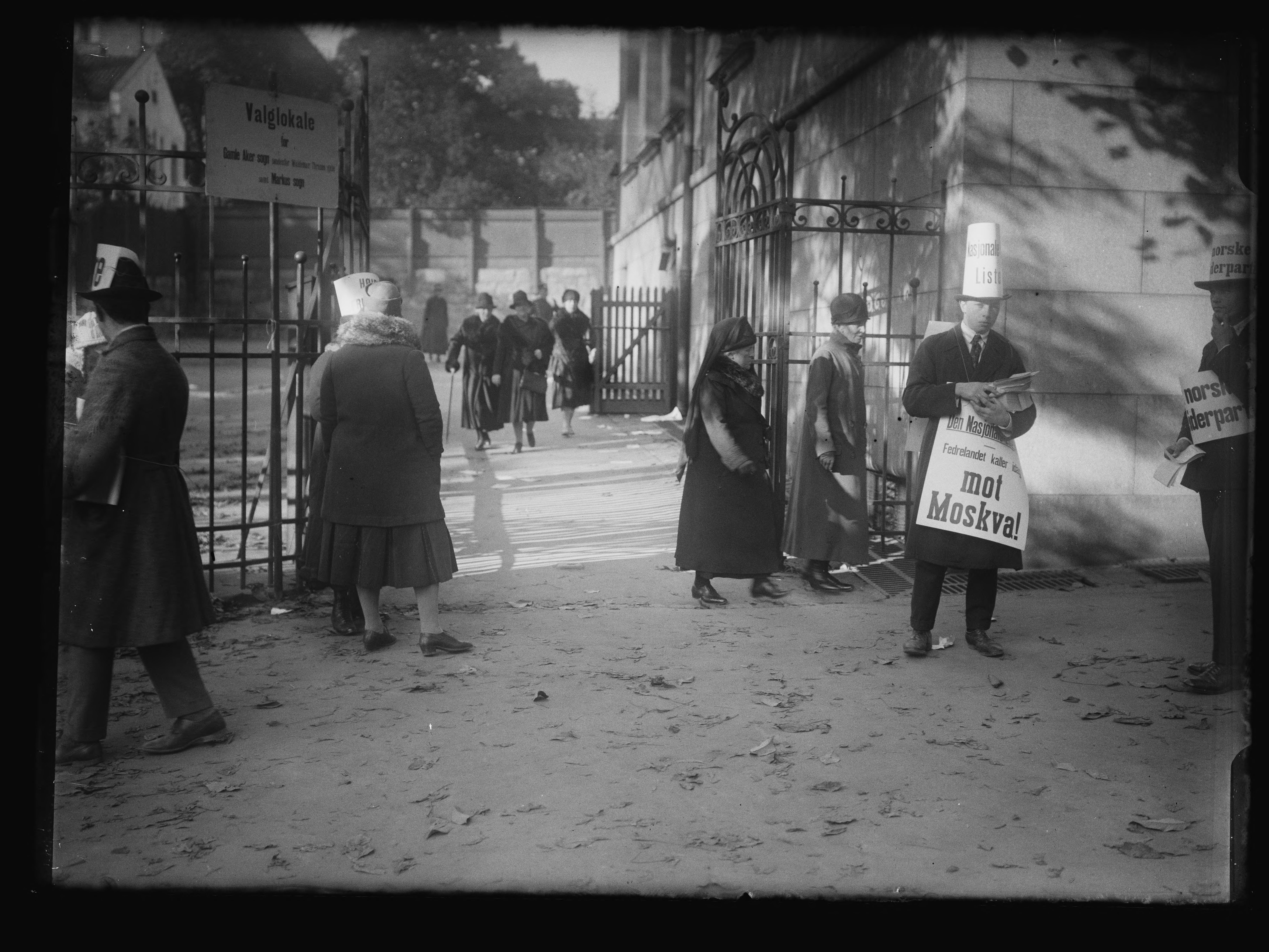 Bildet er hentet fra Nasjonalbibliotekets bildesamling. Anmerkninger til bildet var: Påskrift arkivark: Valgdagen 1927 Arkivnummer: 583 Oslo, Oslo, Oslo